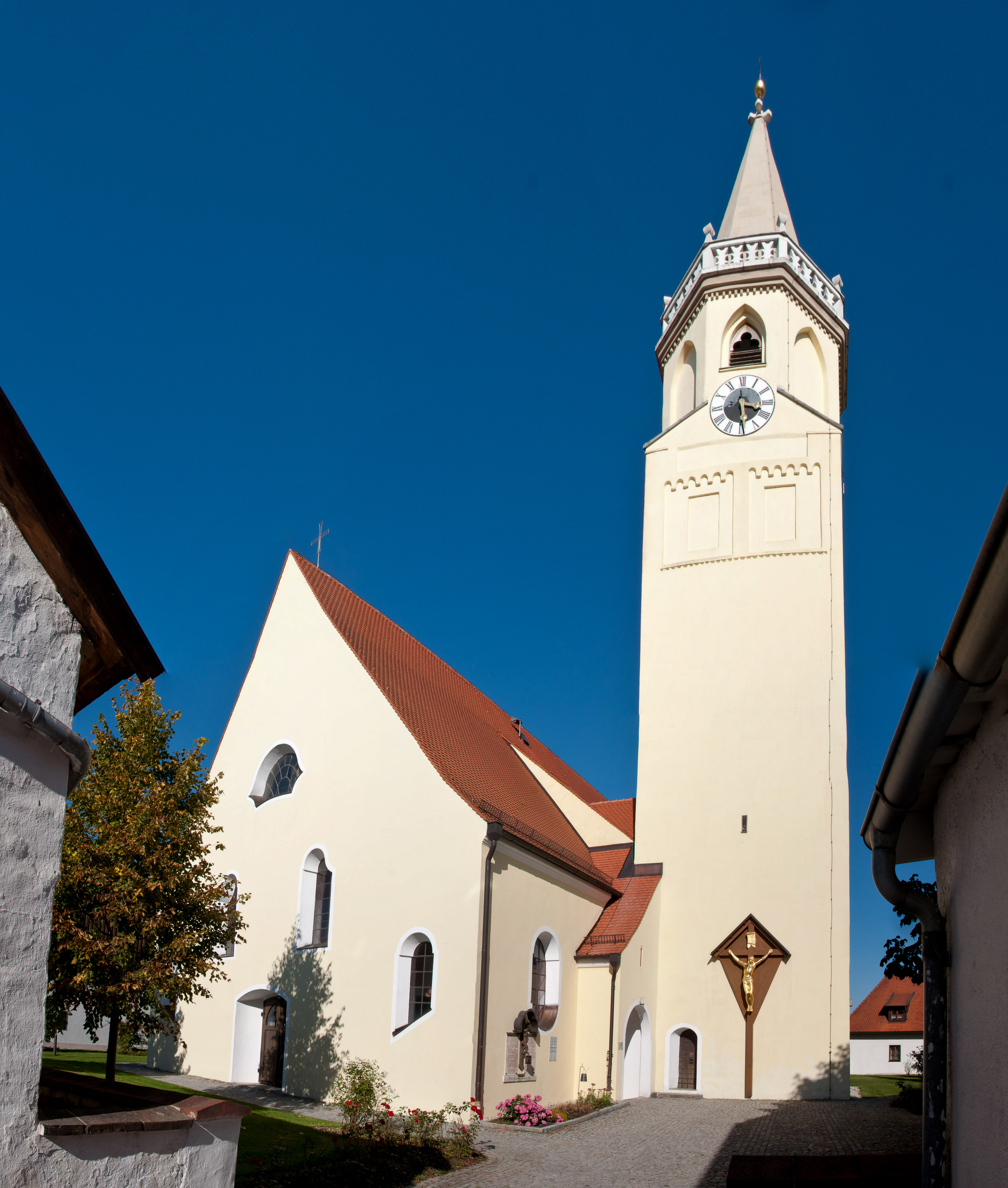 Essenbach, Kath. Kirche Maria Himmelfahrt, Gebäudeaussenansicht, D-2-74-128-1, spätgotisch